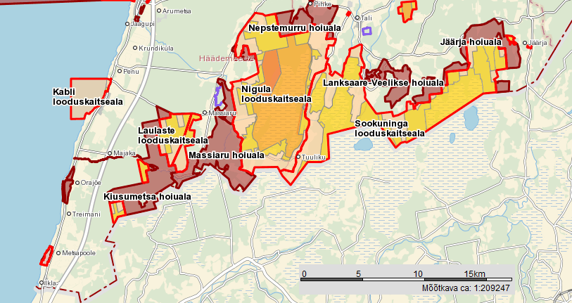 Nigula, Sookuninga, Laulaste ja Kabli looduskaitsealad Maa-ameti kaardil.